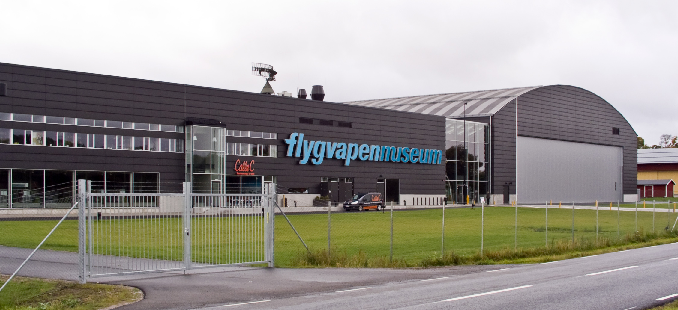 Flygvapenmuseum, Malmslätt, Linköping. Alternative taking.